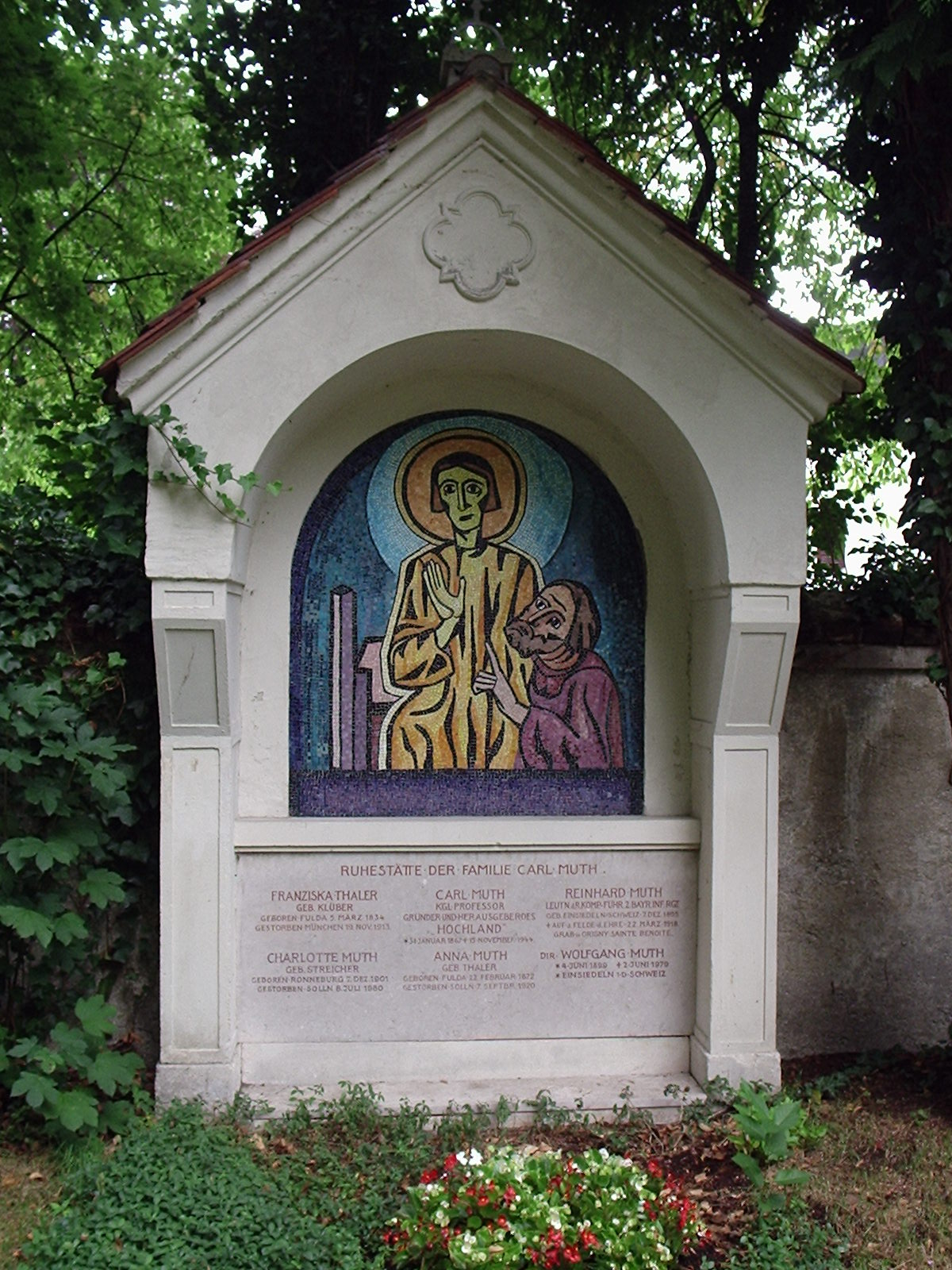 Grabstätte Carl Muth, Friedhof Solln, München